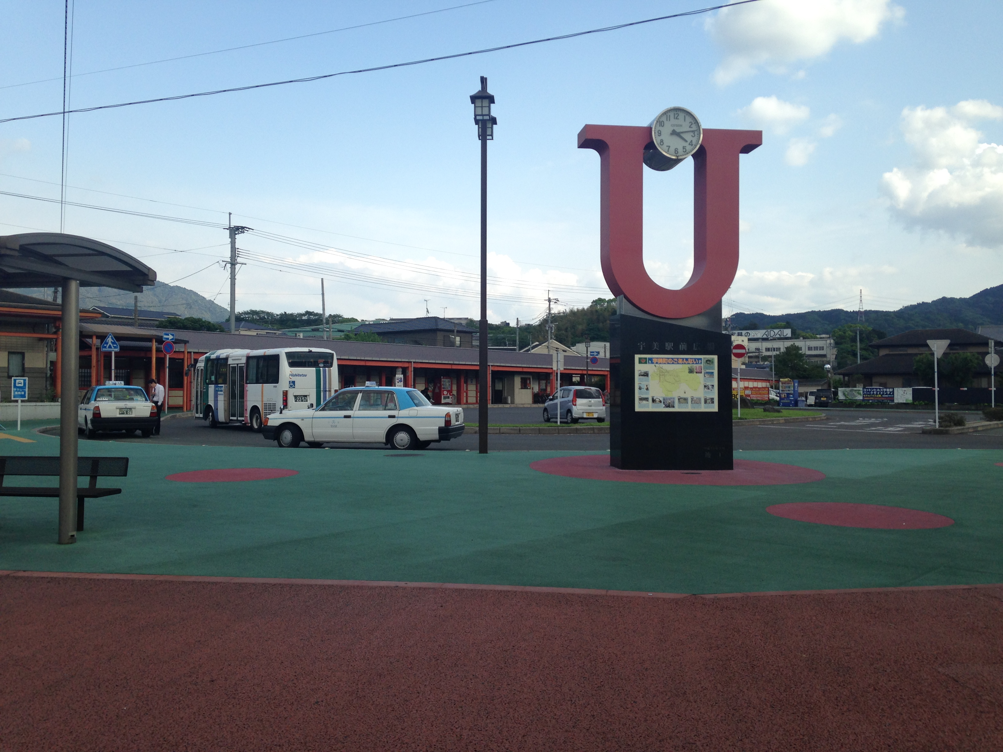 宇美駅前広場